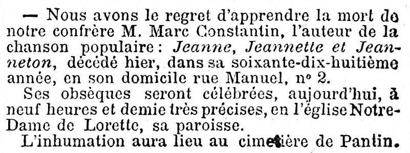 Annonce de la disparition de Marc Constantin en première page du Gaulois le 28 janvier 1888.